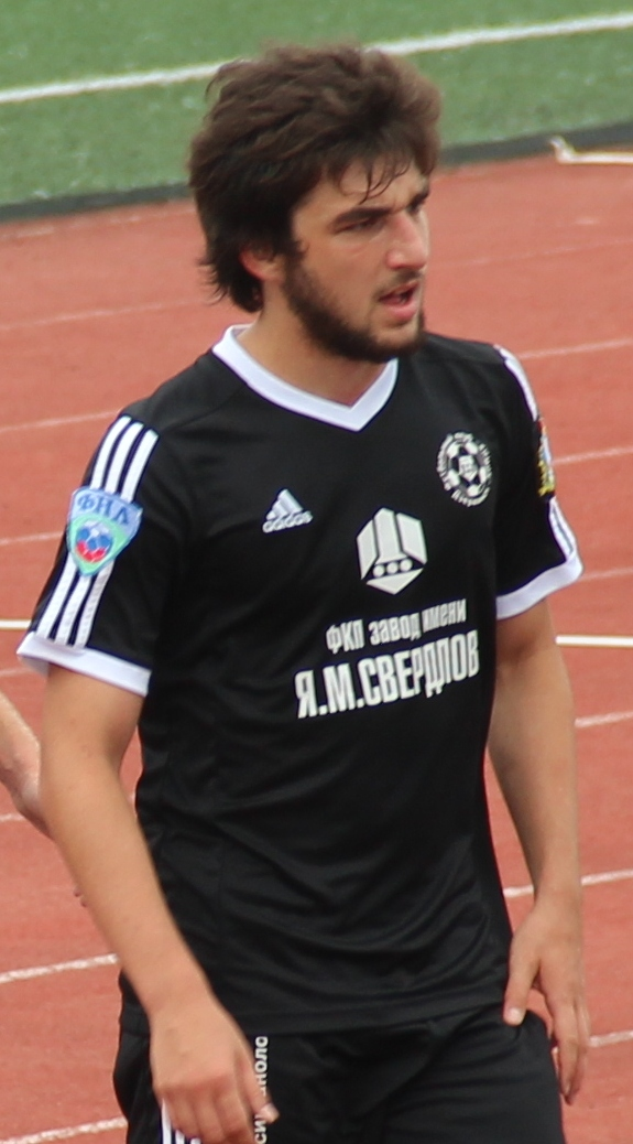 Georgi Dzhikiya